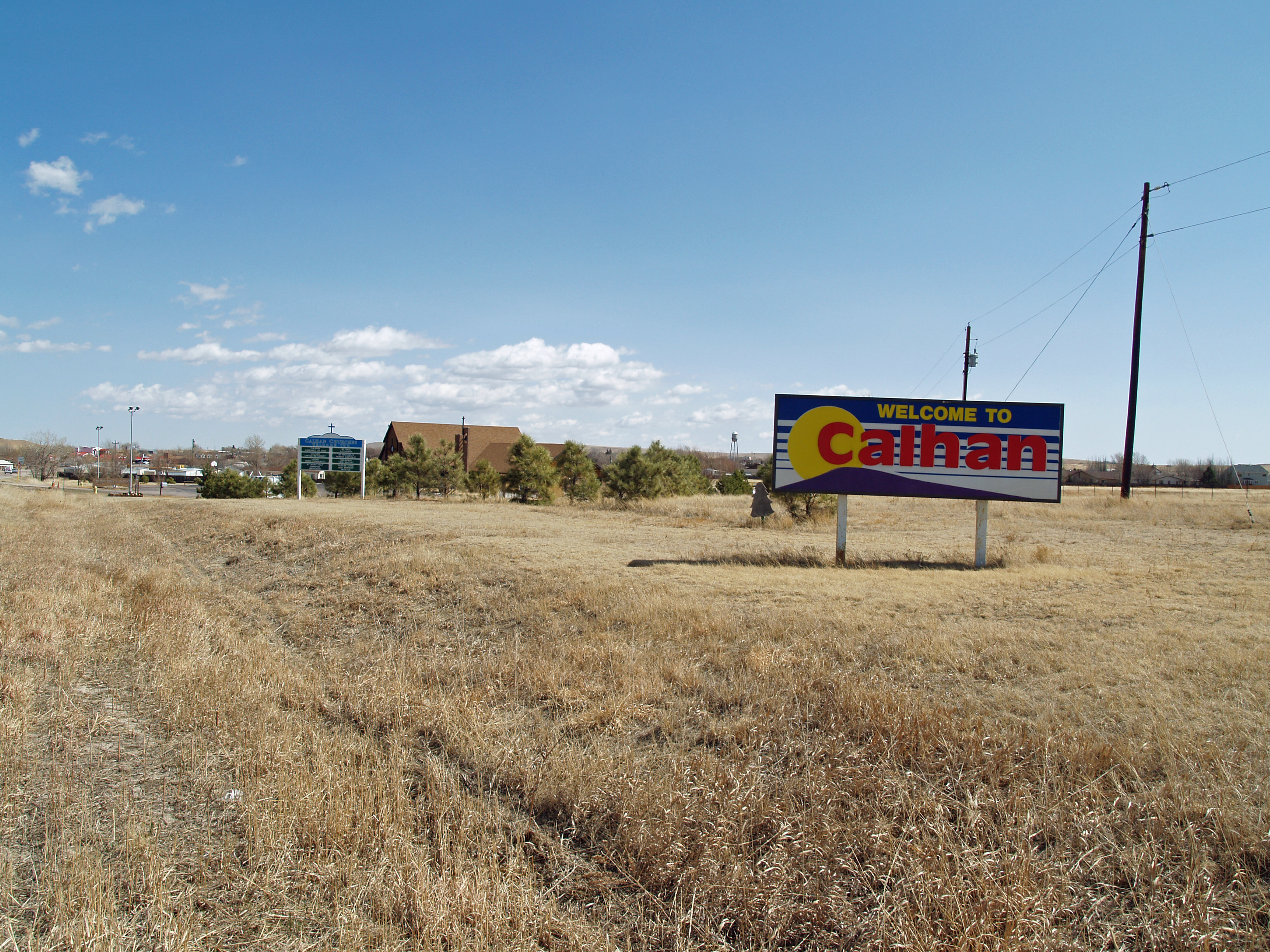 Calhan, Colorado sign.